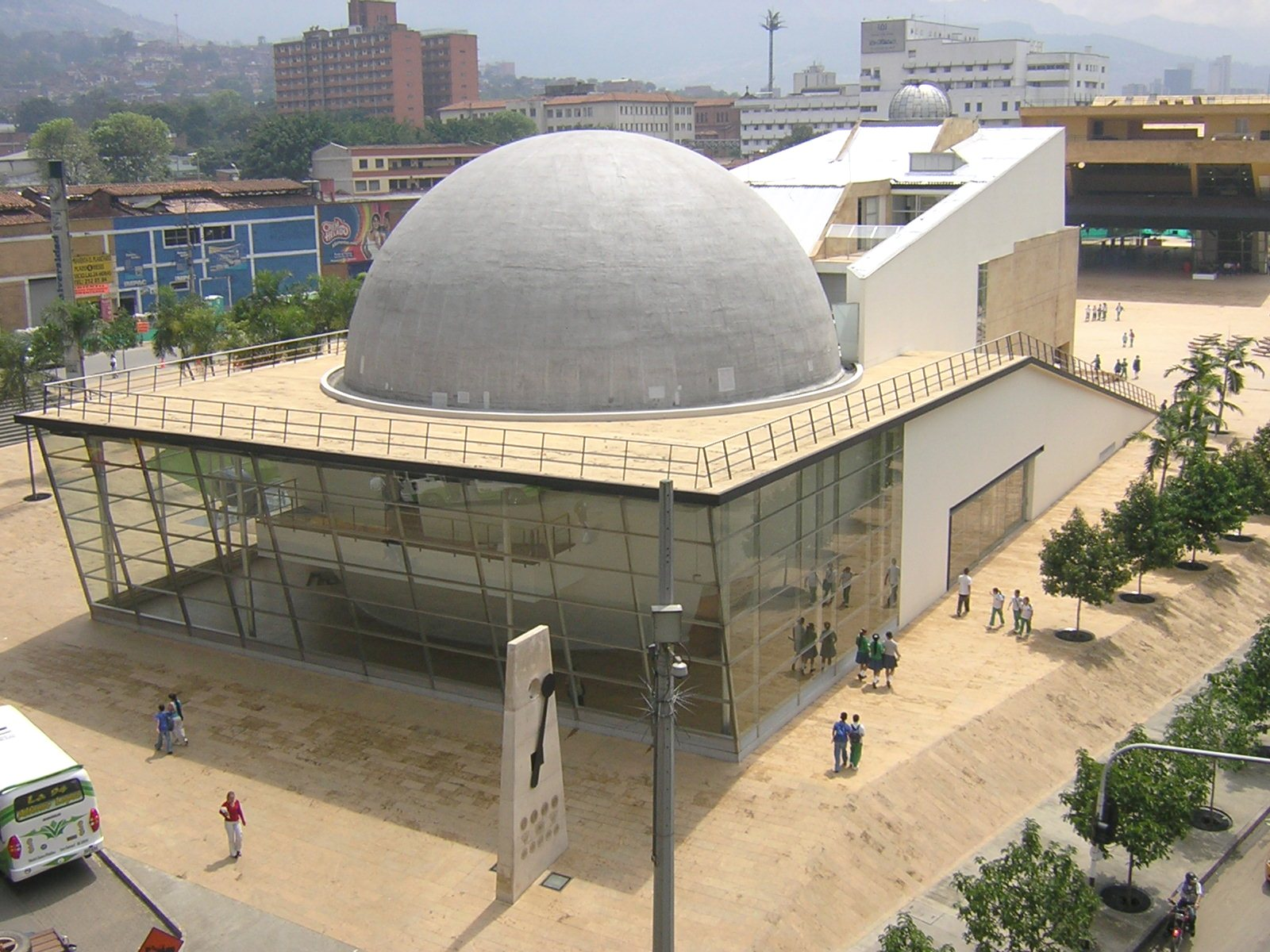 Planetario de Medellín, Colombia.